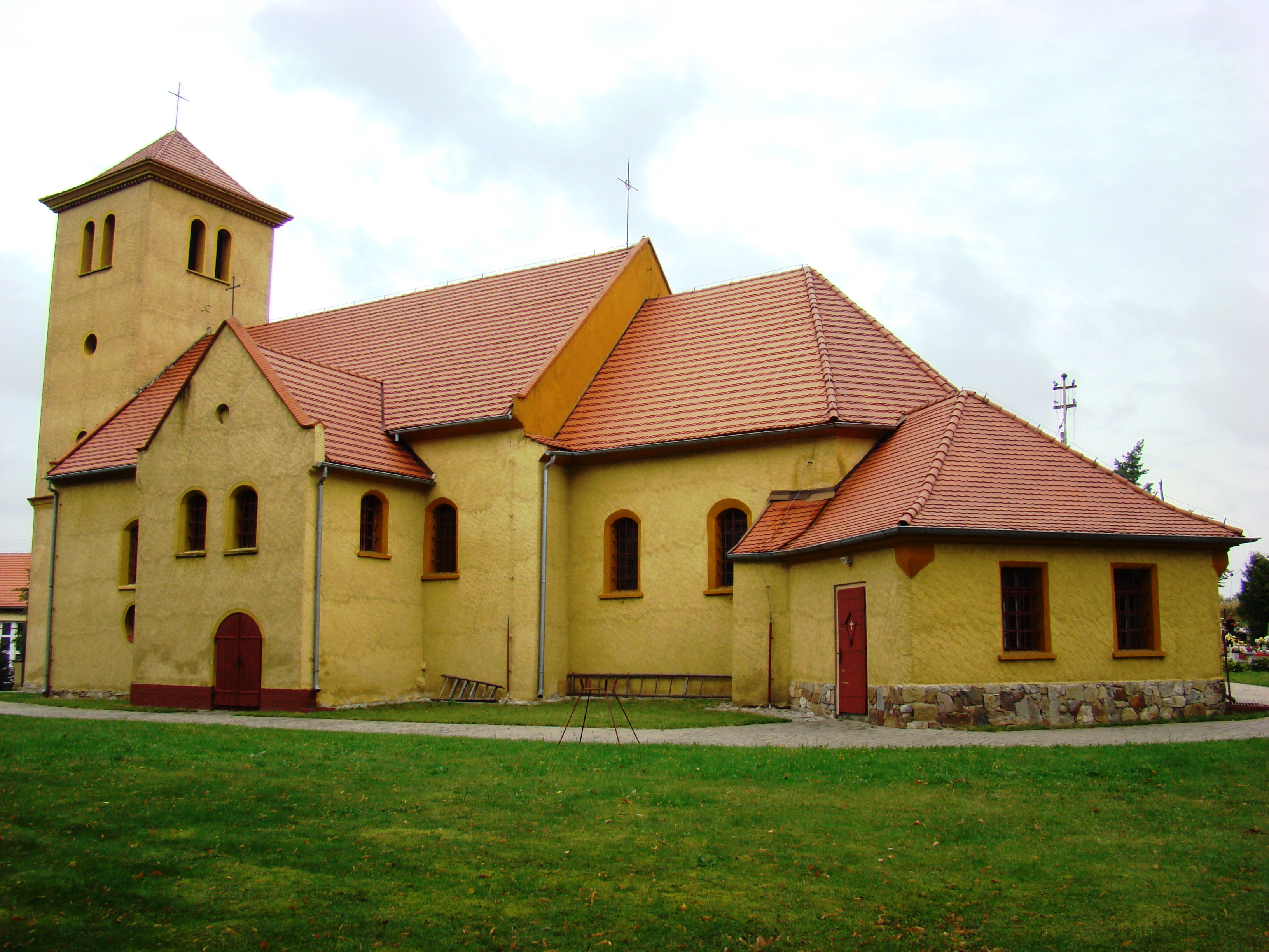 kościół par. p.w. Matki Boskiej Królowej Świata i św. Marcina z 1688 roku, uszkodzony w 1945 roku, odnawiany w 1954 i 1962 roku Gałązczyce, Grodków 01.1955.